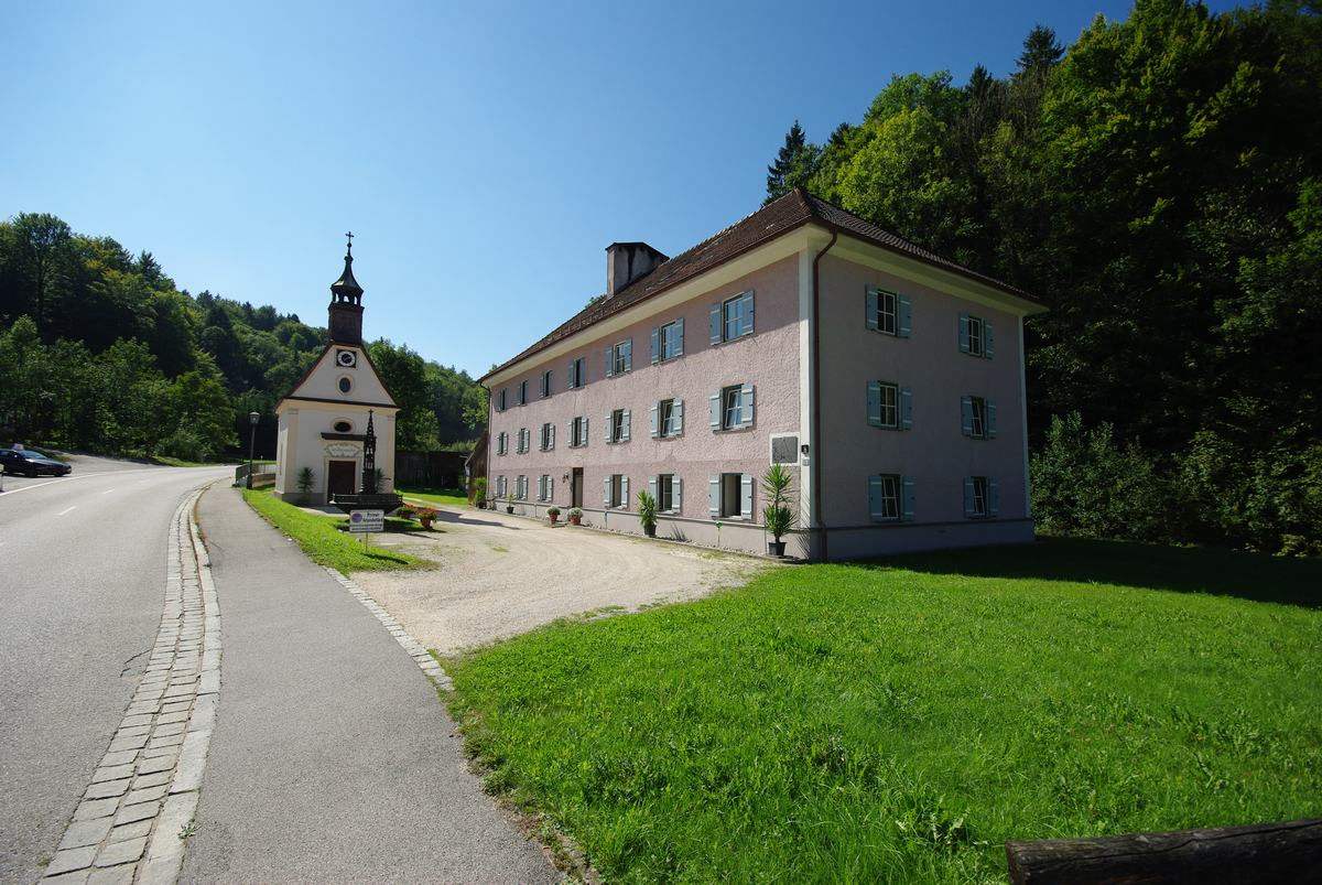 Teisendorfer Str. 61, 83317 Teisendorf (Achthal)This is a photograph of an architectural monument.